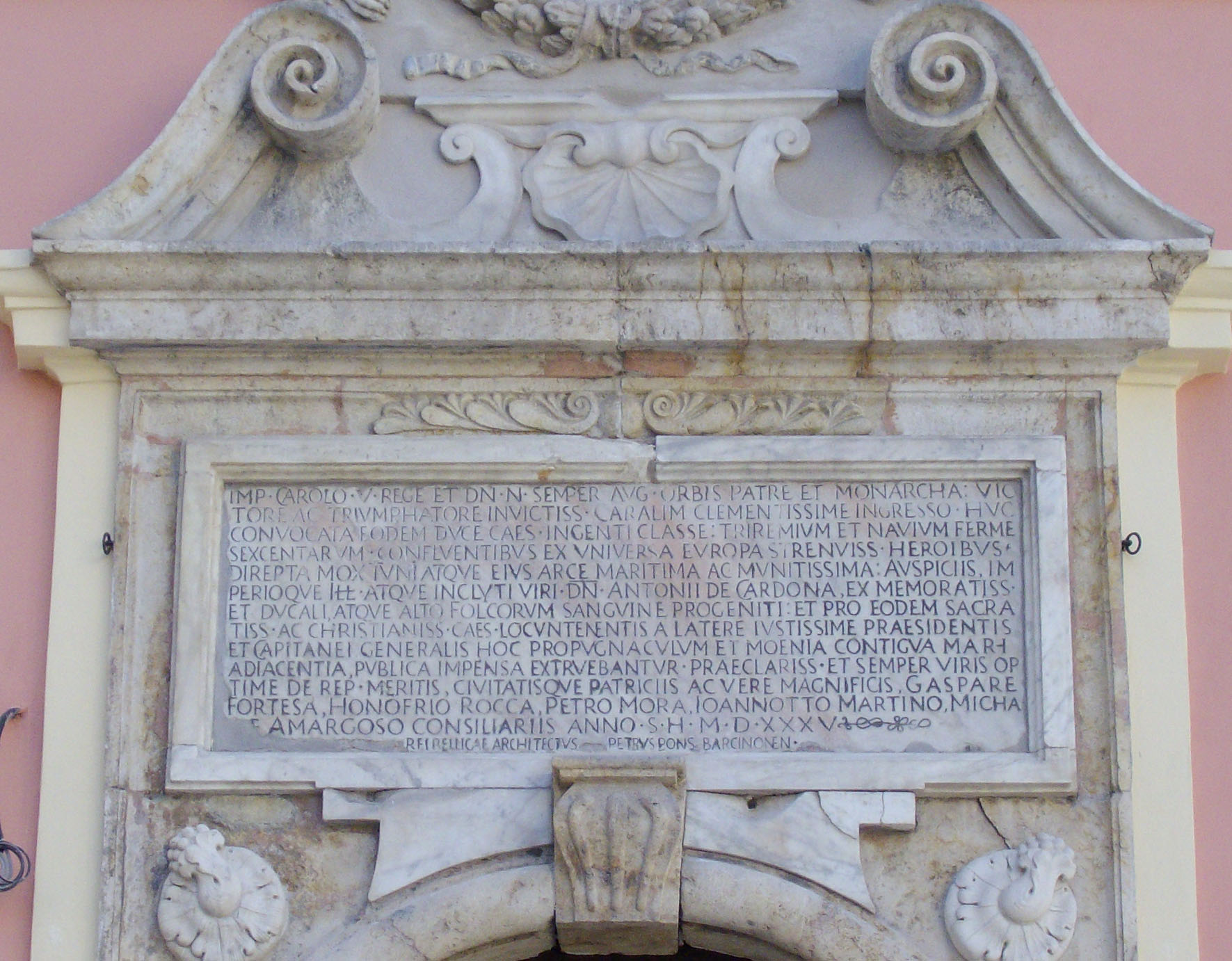 Antico palazzo di città - Cagliari